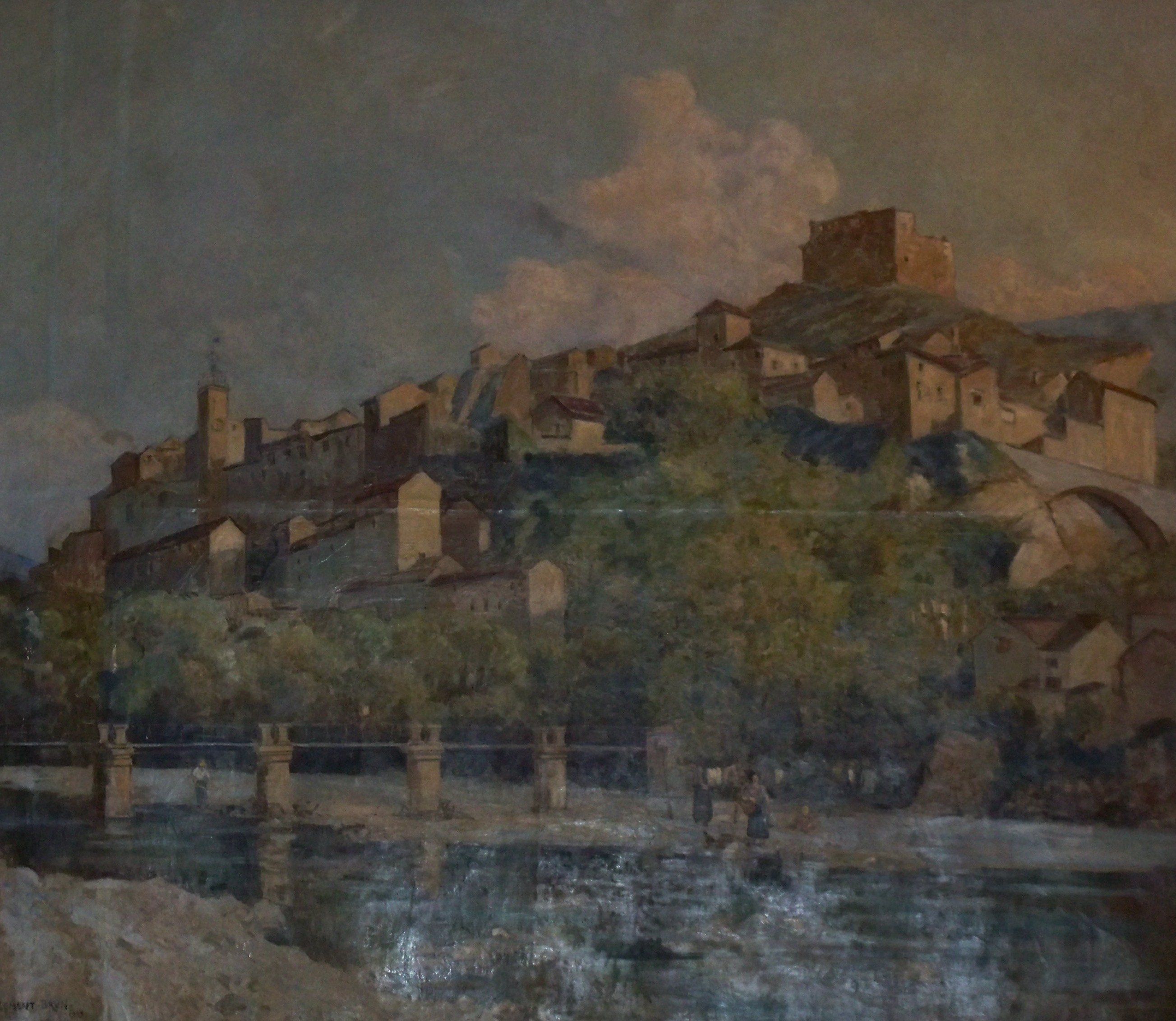 Tableau de Clément Brun (1919), vue générale de Vaison la Romaine, à la mairie de Vaison la Romaine (Vaucluse, France)